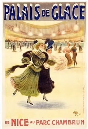 Affiche pour la patinoire du Palais de Glace au Parc Chambrun de Nice (1907).